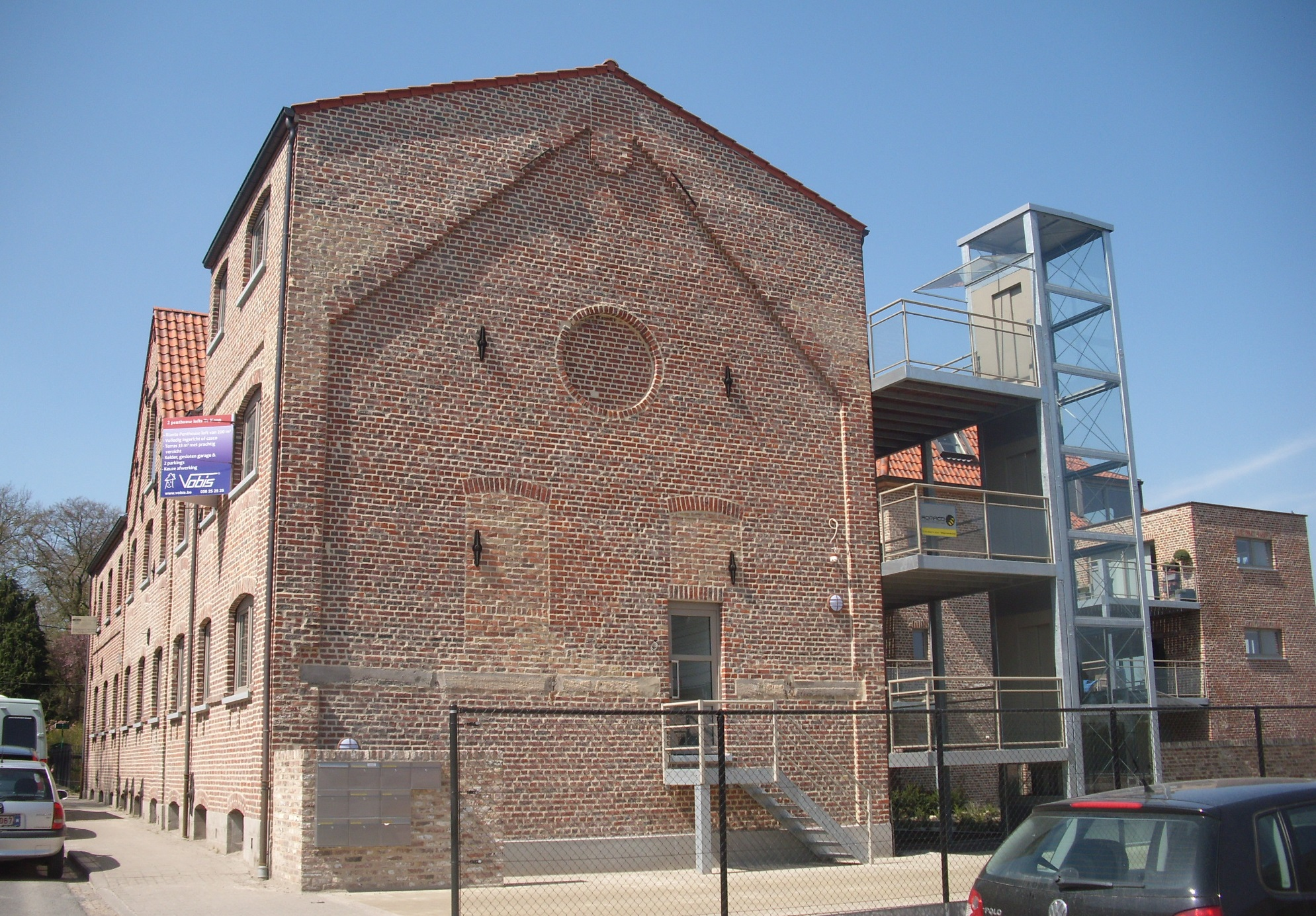 Voormalige Brouwerij Van Cauwenberghe - Oostdorp - Tiegem - Anzegem - West-Vlaanderen - België